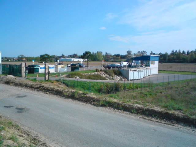 Carte simplifié de la ville du Passage d'Agen